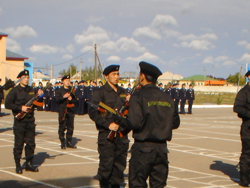 Әскери ант беру.